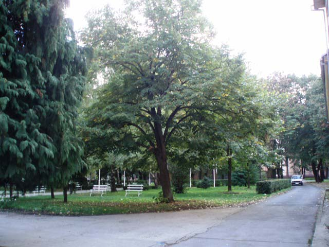 erdevicki park